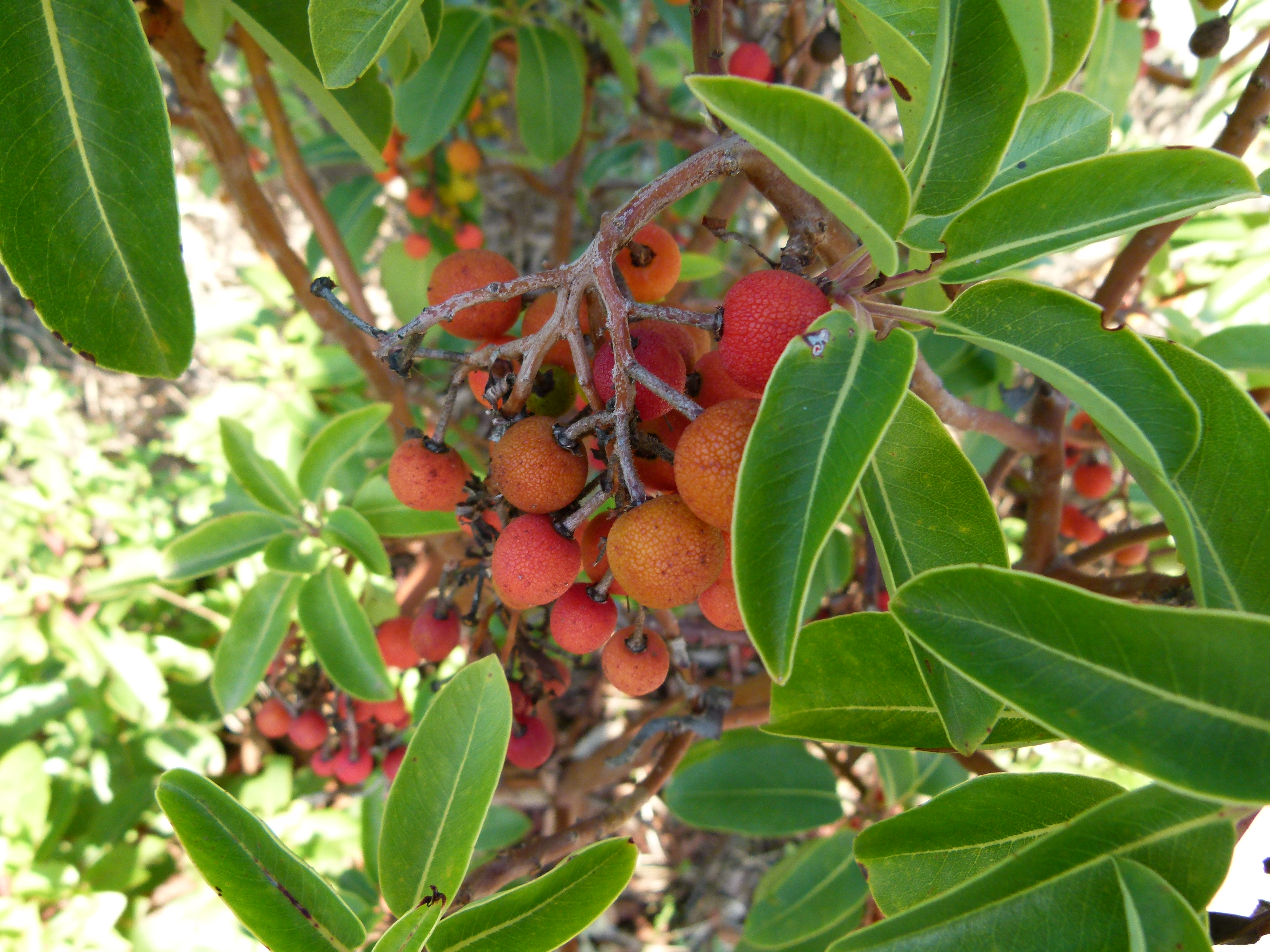 Jardin botanique Barcelone